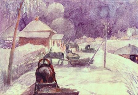 Акварель С.П.Волкова